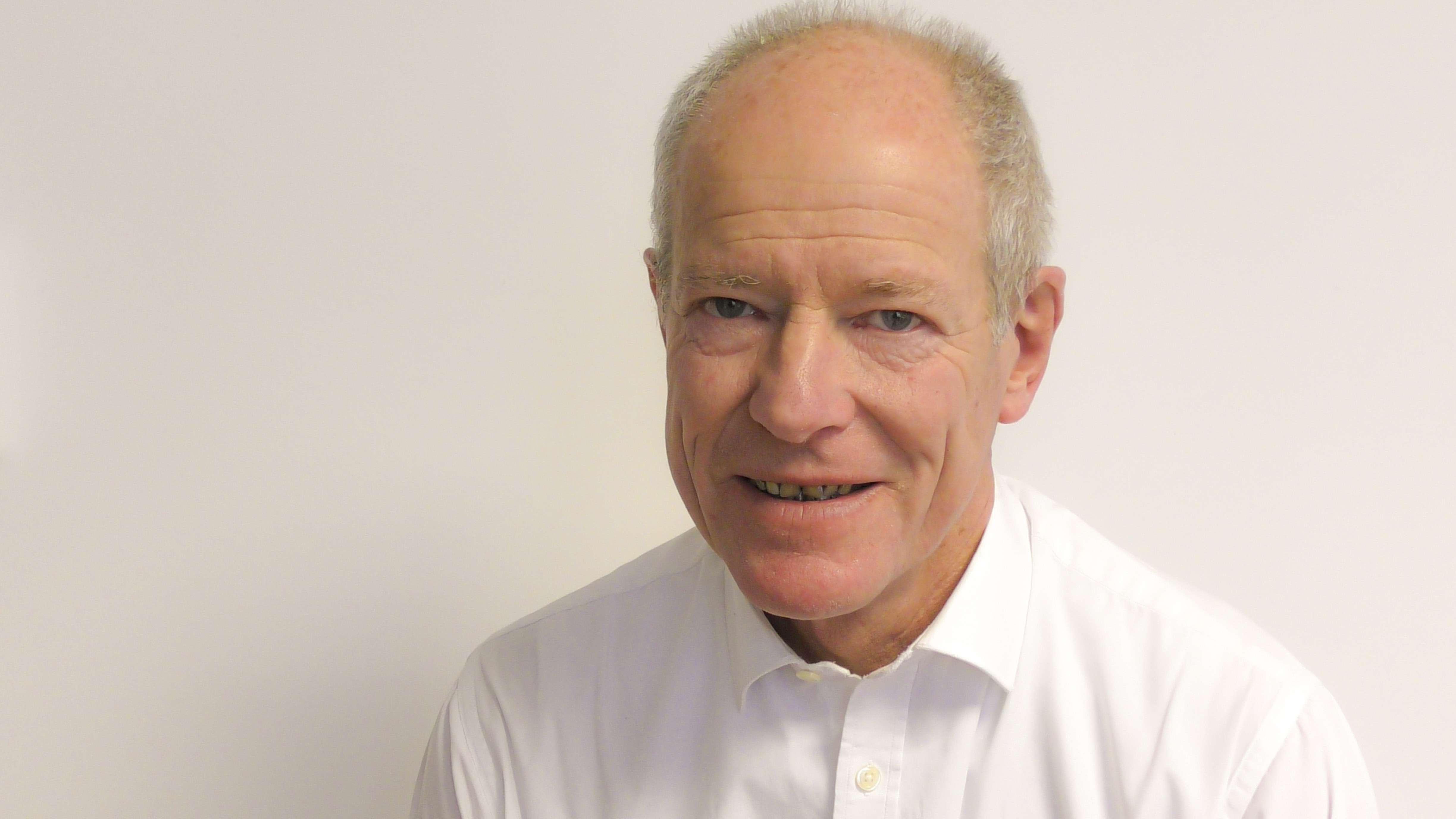 Photo de Laurent Moutinot du 14 février 2018